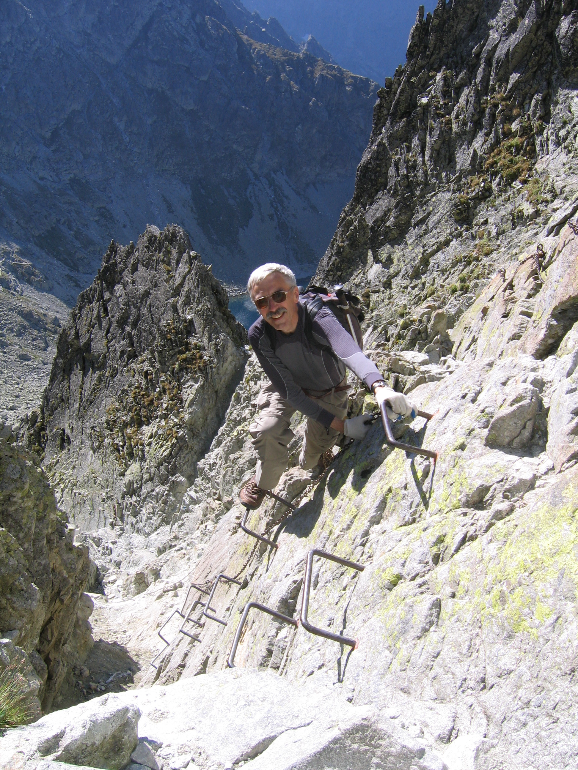 Zejście po klamrach z Rohatki w kier. Dol. Białej Wody